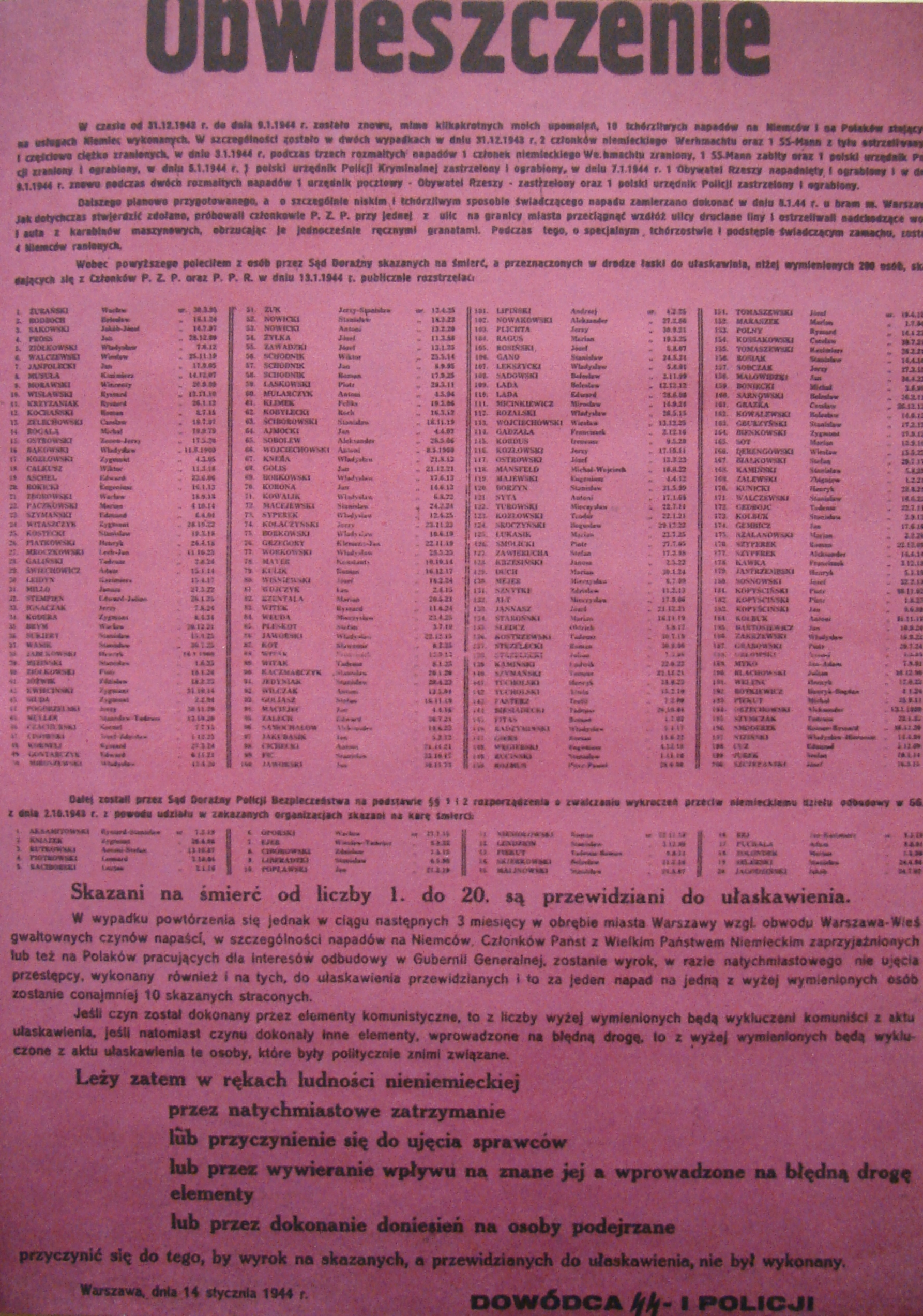 Obwieszczenie z 14 stycznia 1944 roku o egzekucji ulicznej 200 Polaków.